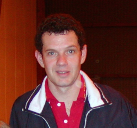 Patrick Chila